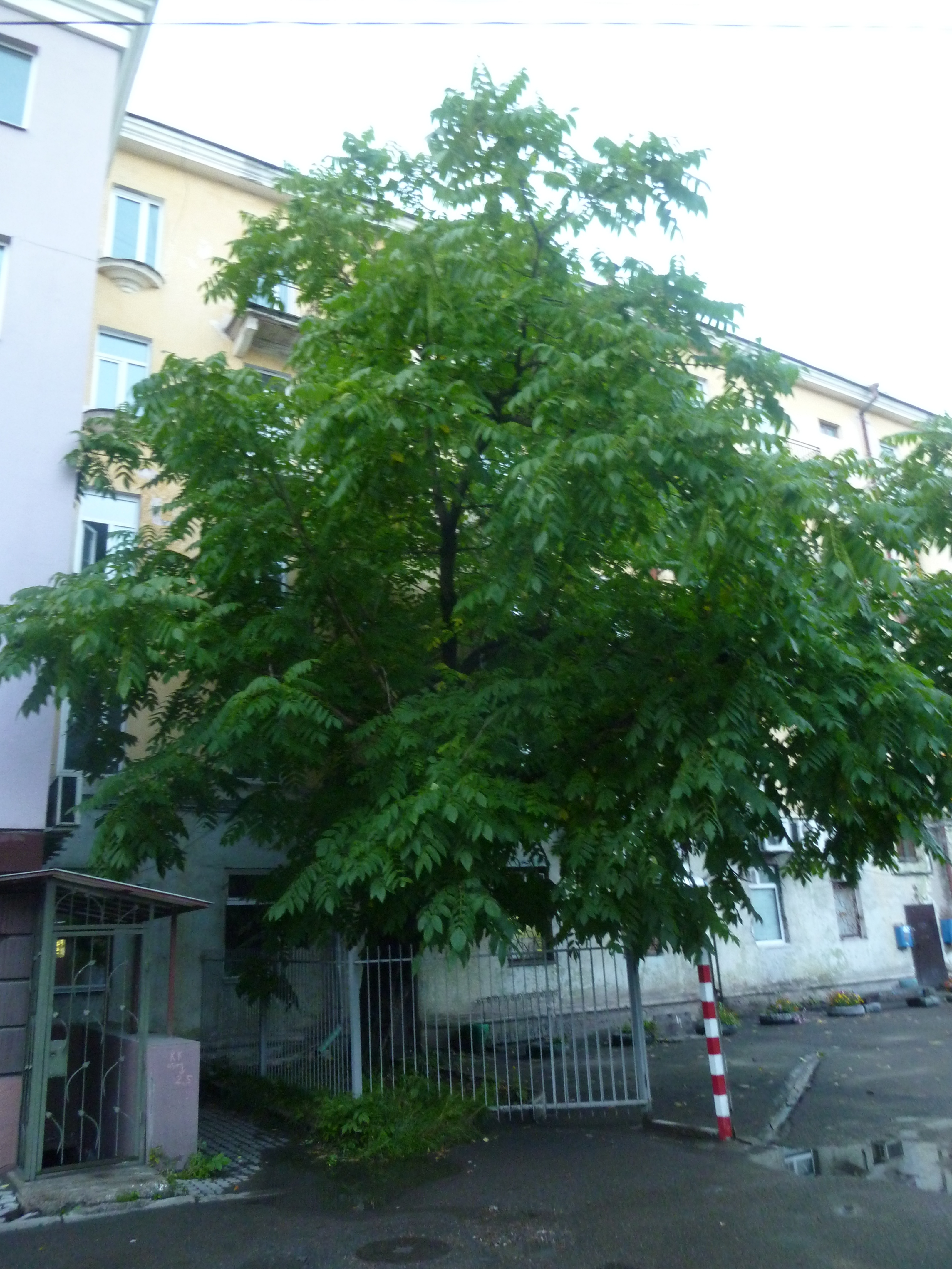 Один из корпусов Сибирского федерального университета